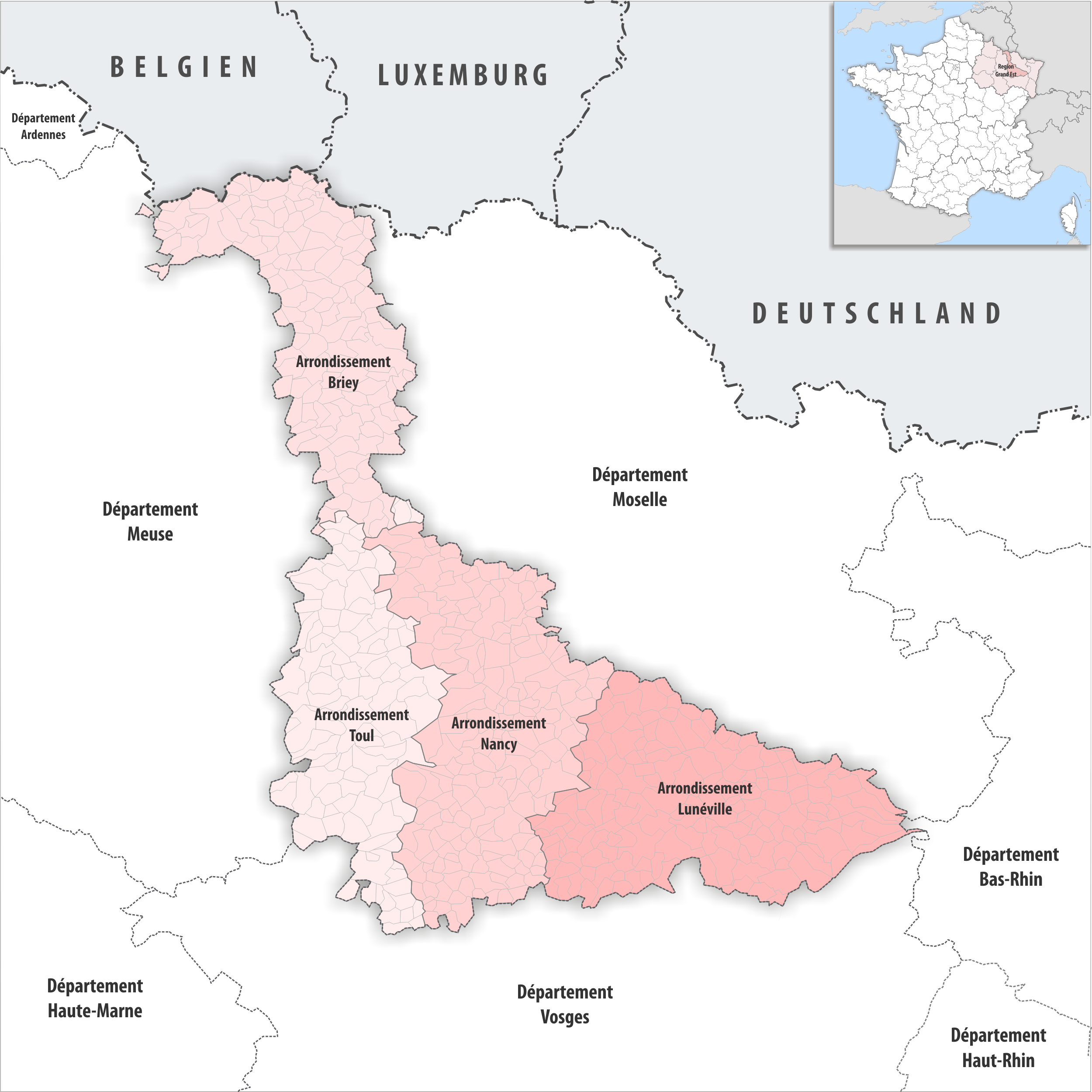 Gemeinden und Arrondissemente im Departement Meurthe-et-Moselle